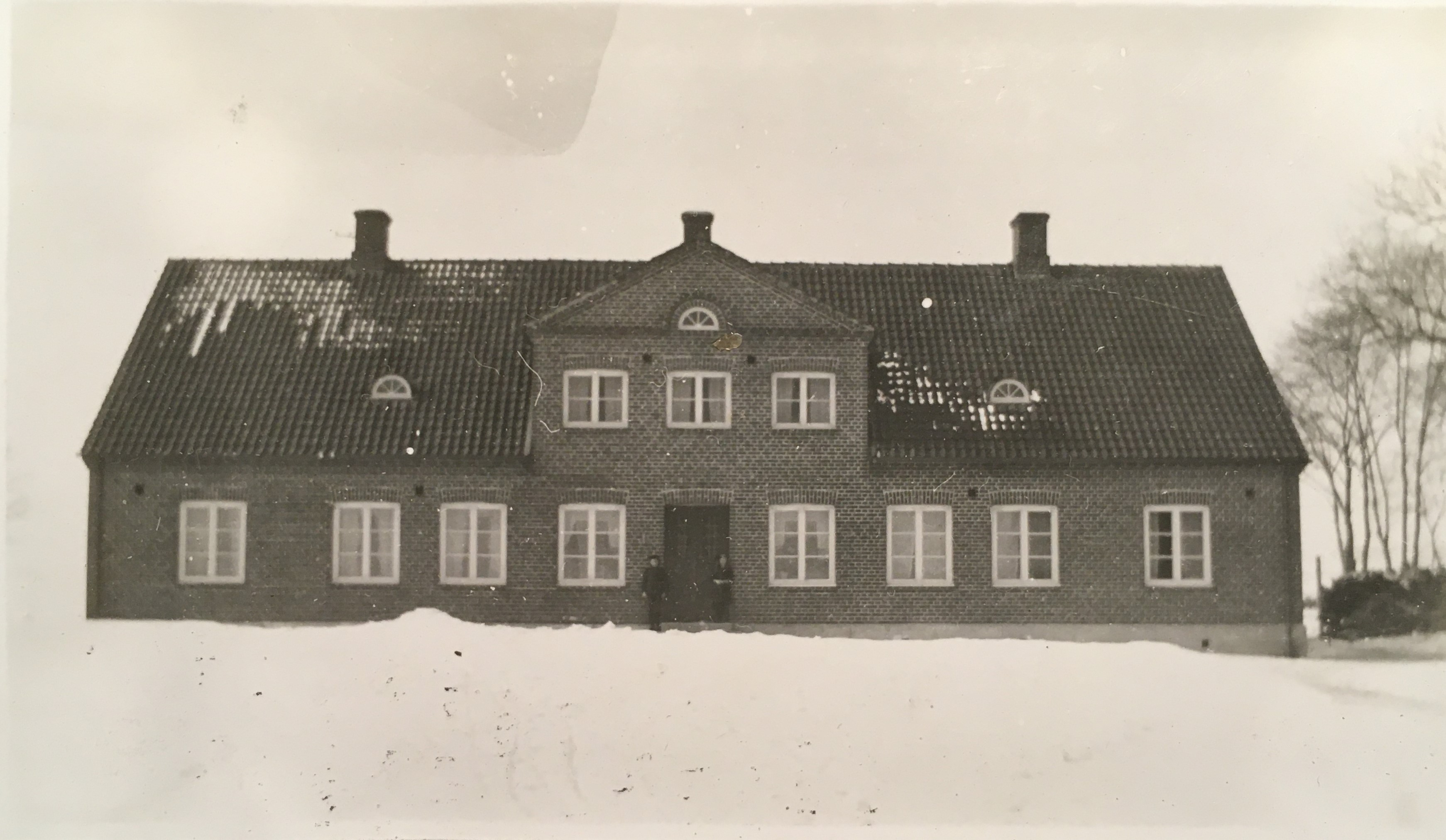 Prästgården som byggdes 1922